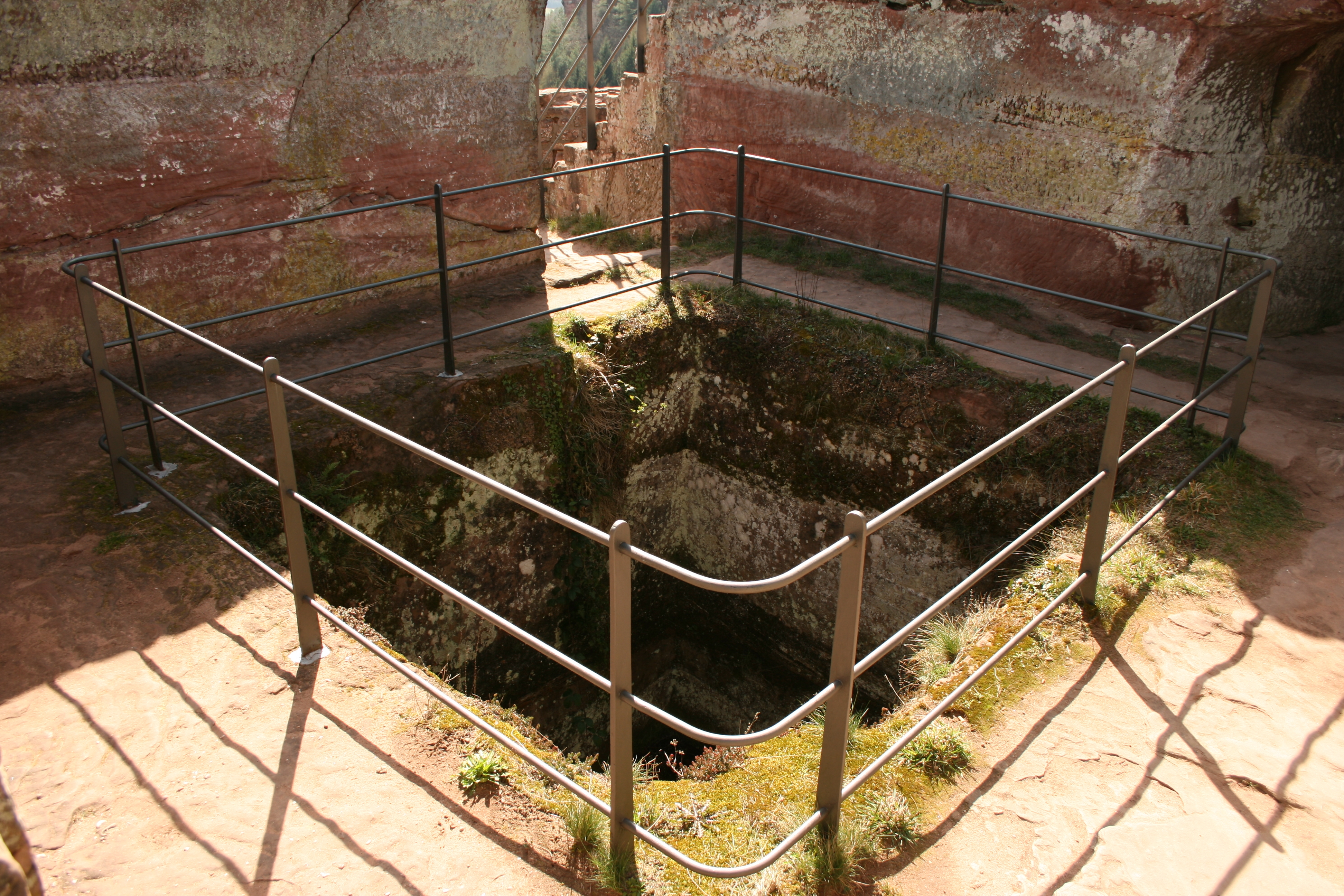 Zisterne der Burg Tanstein, Teil der Dahner Burgengruppe.